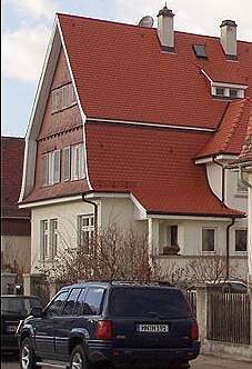 Gebäude Liebigstraße 10 in Heilbronn. Ausschnitt aus File:Hn-liebigstr8.jpg